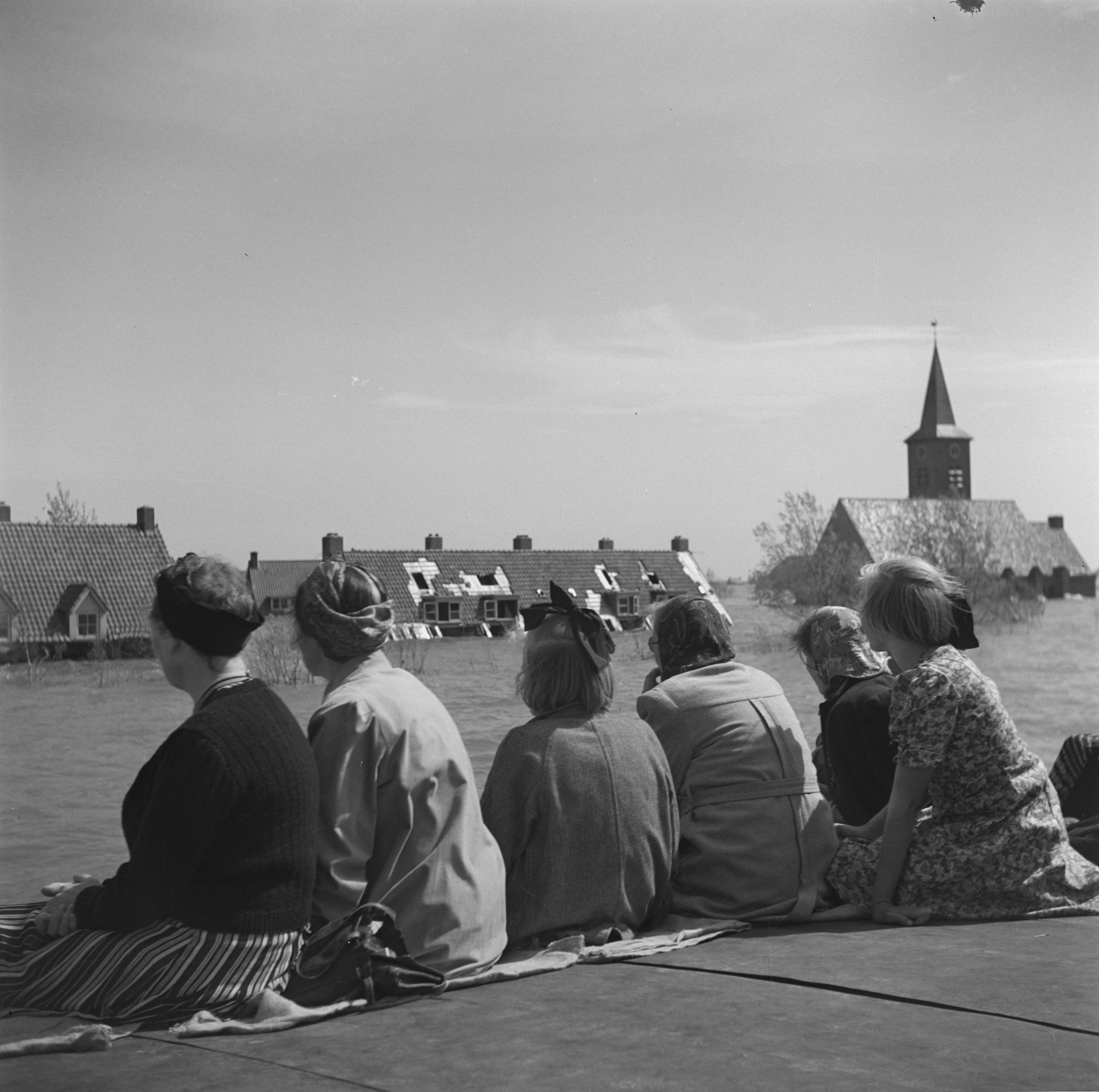 Collectie / Archief : Fotocollectie Anefo Reportage / Serie : Vernielingen: Wieringermeer Beschrijving : Overstroming van de Wieringmeerpolder. Op 17 april 1945 hebben de Duitsers nog de dijk doorgestoken die de Wieringermeer van het IJsselmeer scheidt. Annotatie : Groep vrouwen kijkt vanaf het dek van een schip naar het ondergelopen Middenmeer Datum : mei 1945 Locatie : Wieringermeer Trefwoorden : inundaties, overstromingen, verwoestingen Fotograaf : Poll, Willem van de / Anefo Auteursrechthebbende : Nationaal Archief Materiaalsoort : Negatief (zwart/wit) Nummer archiefinventaris : bekijk toegang 2.24.01.03 Bestanddeelnummer : 900-3181